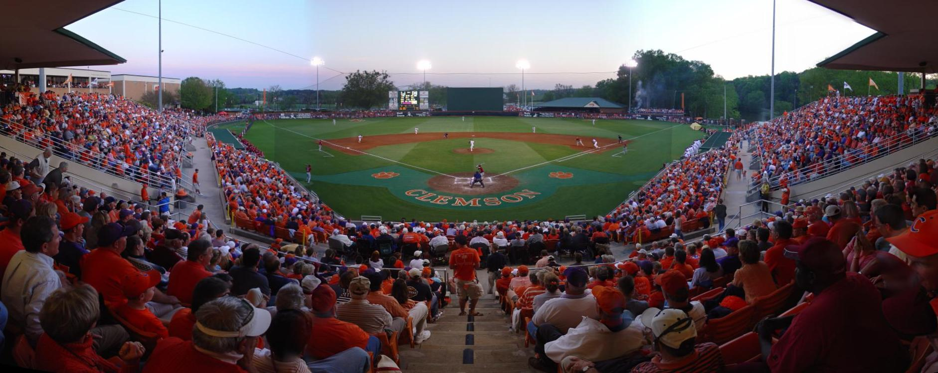 Made by me, Jober14